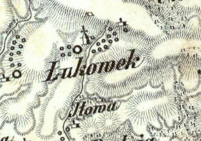 Łukówek (Ziemia chełmska) na mapie Reymanna, XIX w.